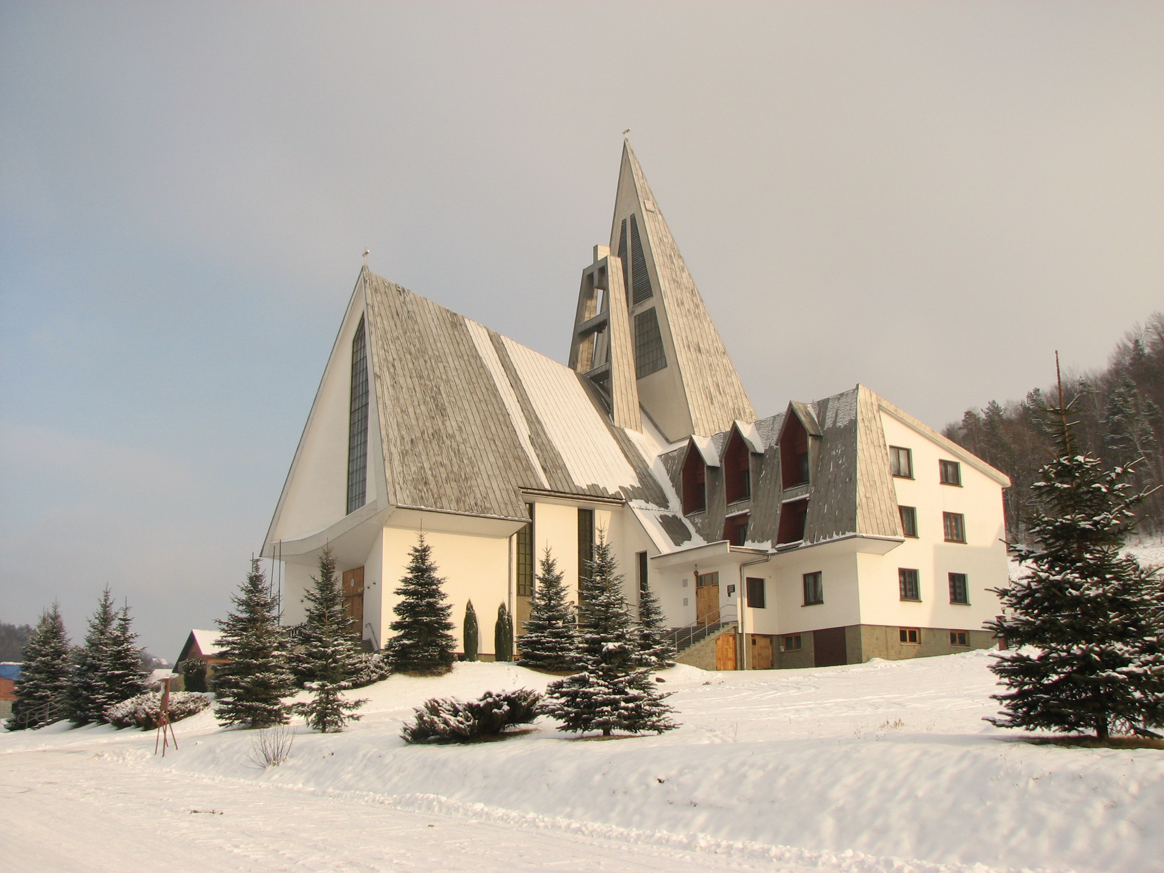 Gródek nad Dunajcem - kościół parafialny p.w. Najświętszej Maryi Panny Królowej